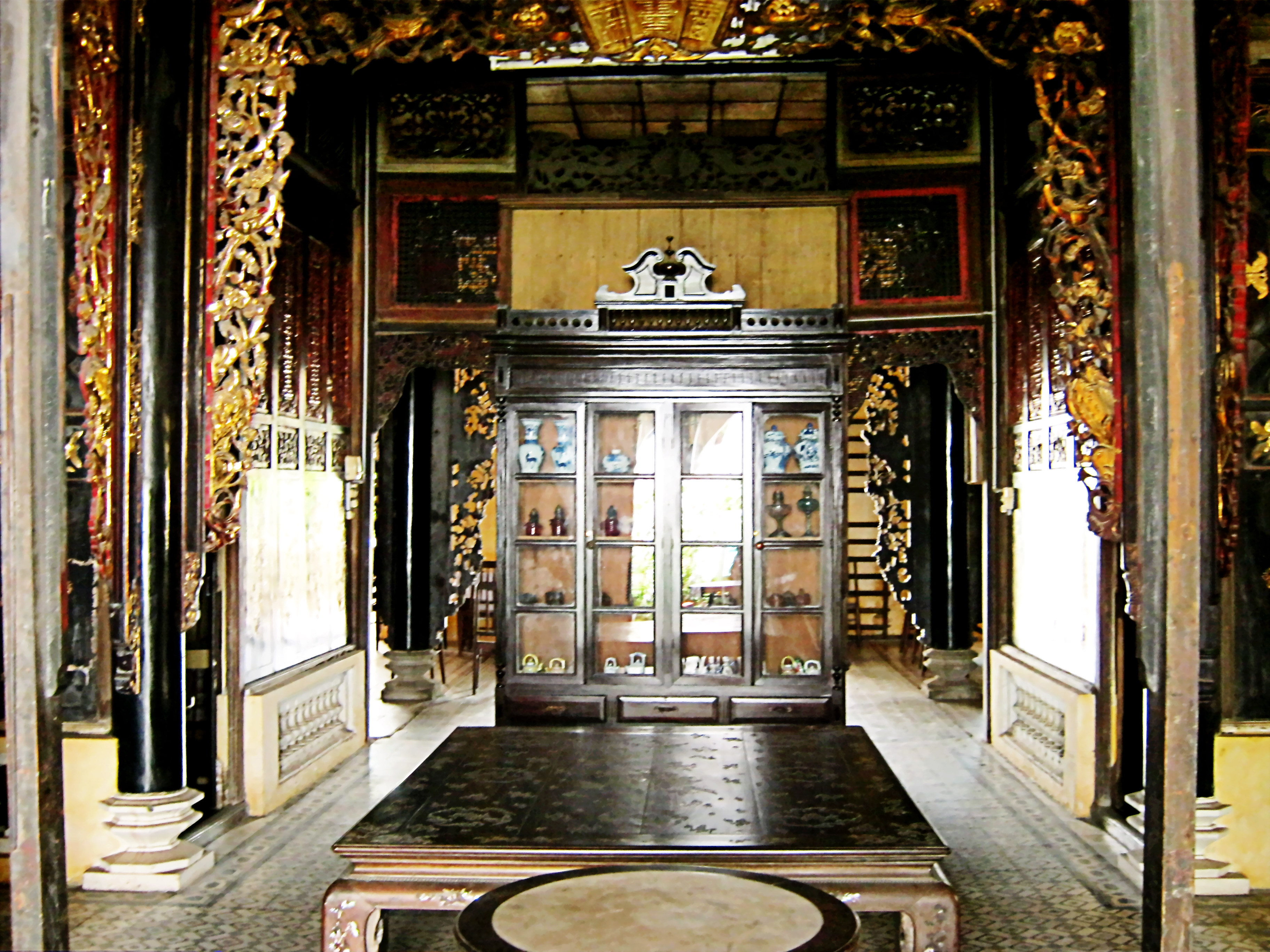 Vật dụng trong Nhà Cổ Huỳnh Thủy Lê ở thị xã Sa Đéc, tỉnh Đồng Tháp, Việt Nam.